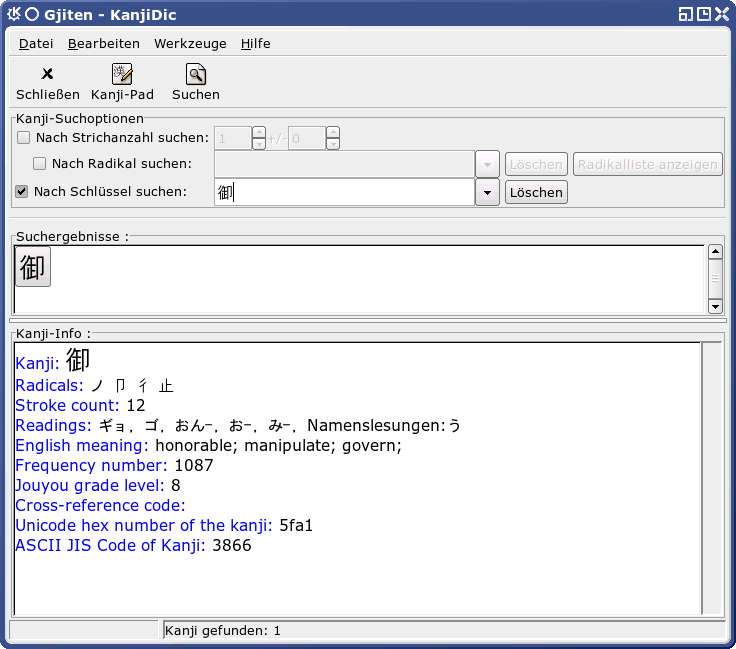 screenshot of gjiten / KanjiDic